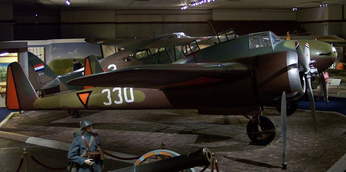 Fokker G.1A Replica in Soesterberg